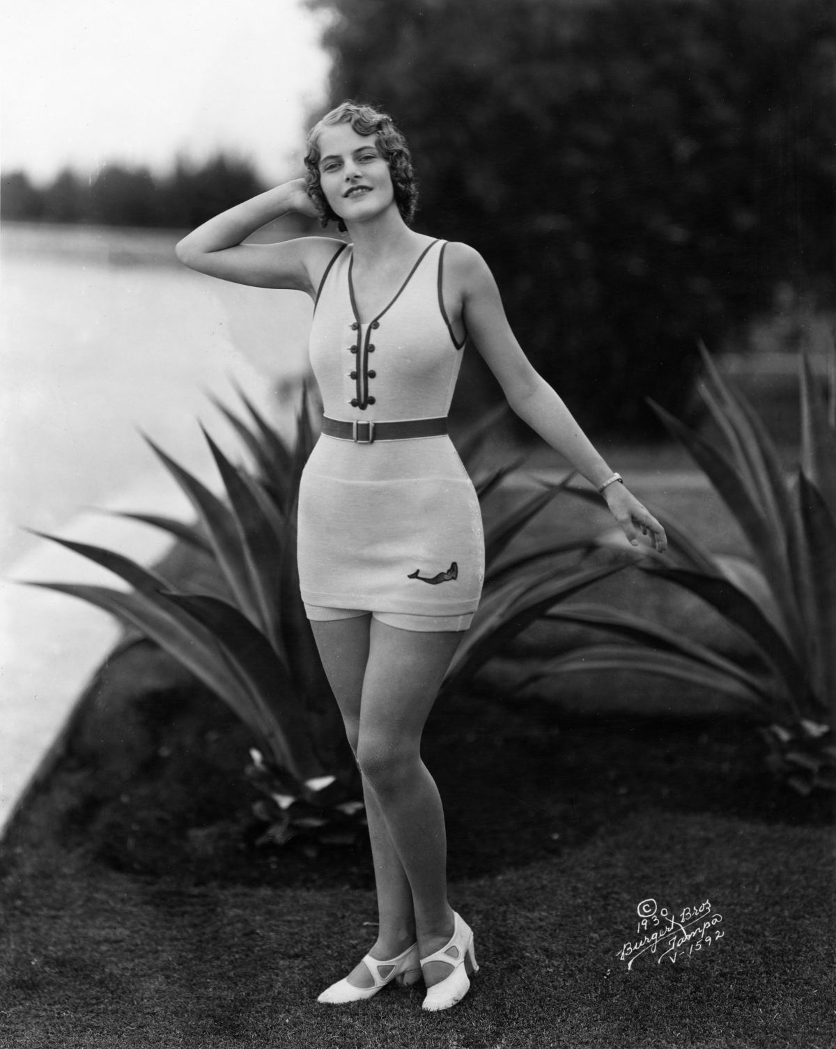 Fotografi av Margaret Ekdahl